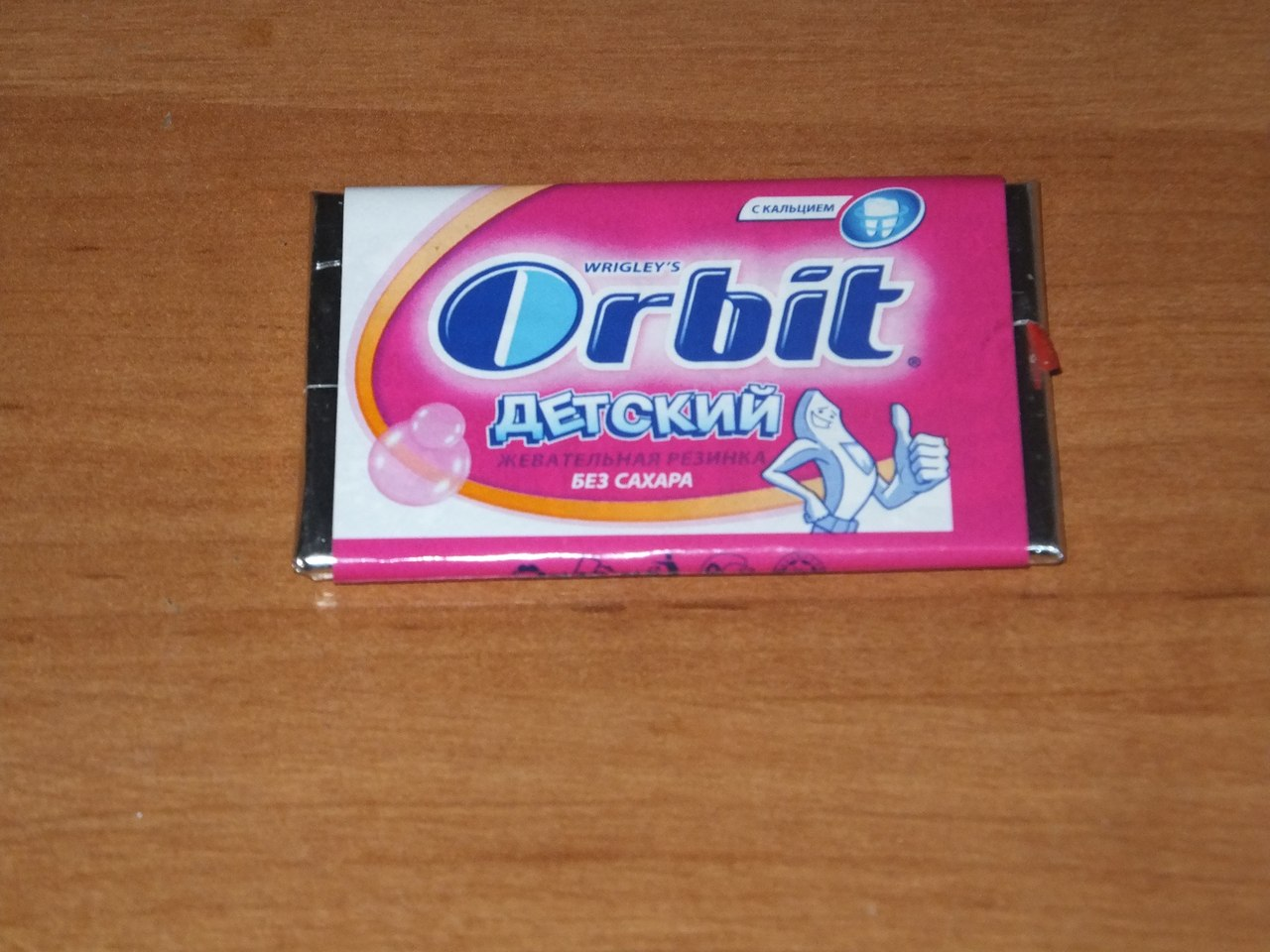 Орбит детский